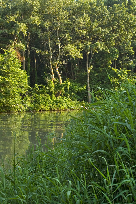 Устието на река Камчия